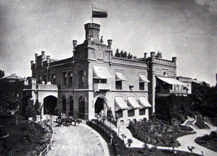 Особняк Штайнгайлів. Київ, вул. Бульварно-Кудрявська (нині вул. Воровського, 27).